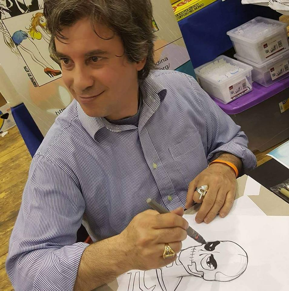 Ivano Codina